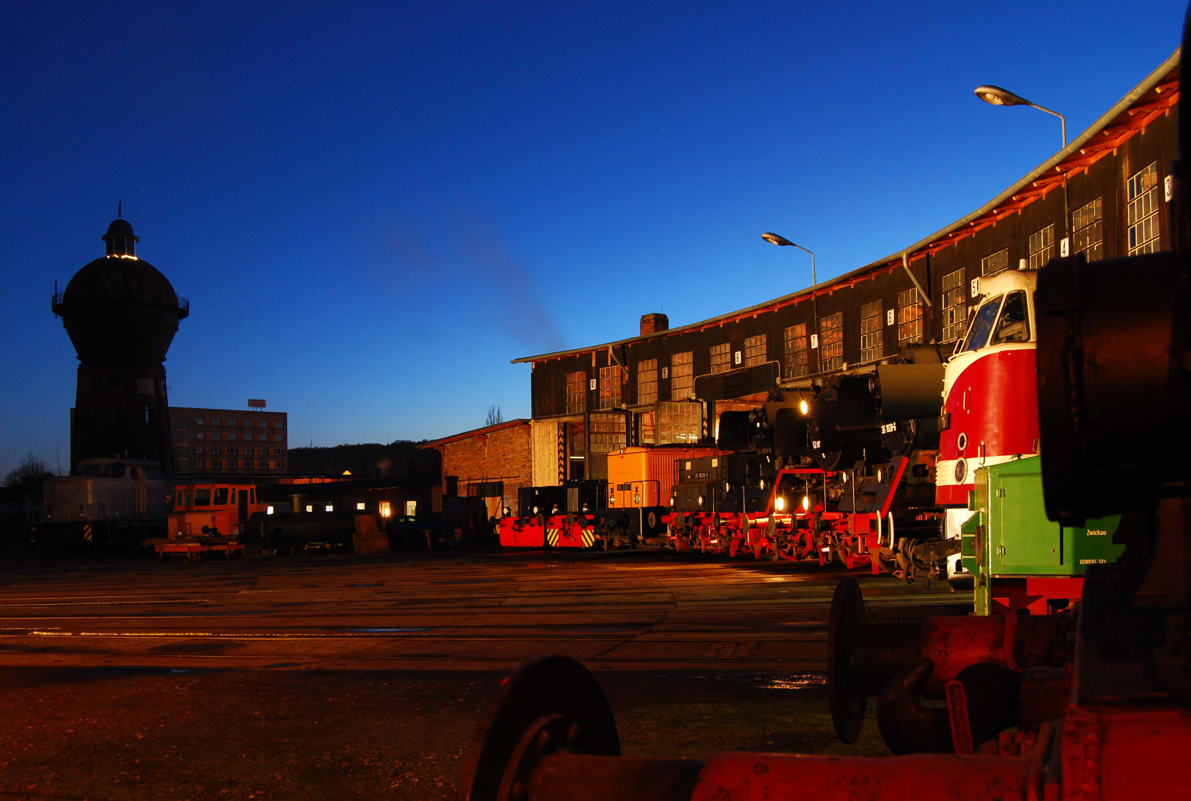 Lokschuppen und Wasserturm zur Blauen Stunde am 24.02.2017